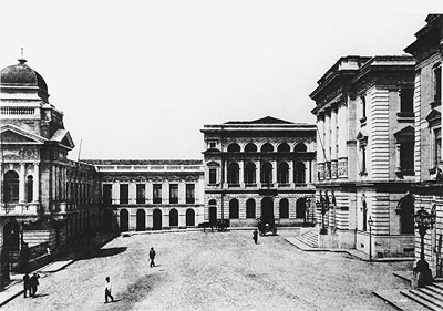 Largo do Palácio (Pátio do Colégio), 1898. Gaensly & Lindemann. Acervo do Museu de Arte de São Paulo Assis Chateaubriand (SP).